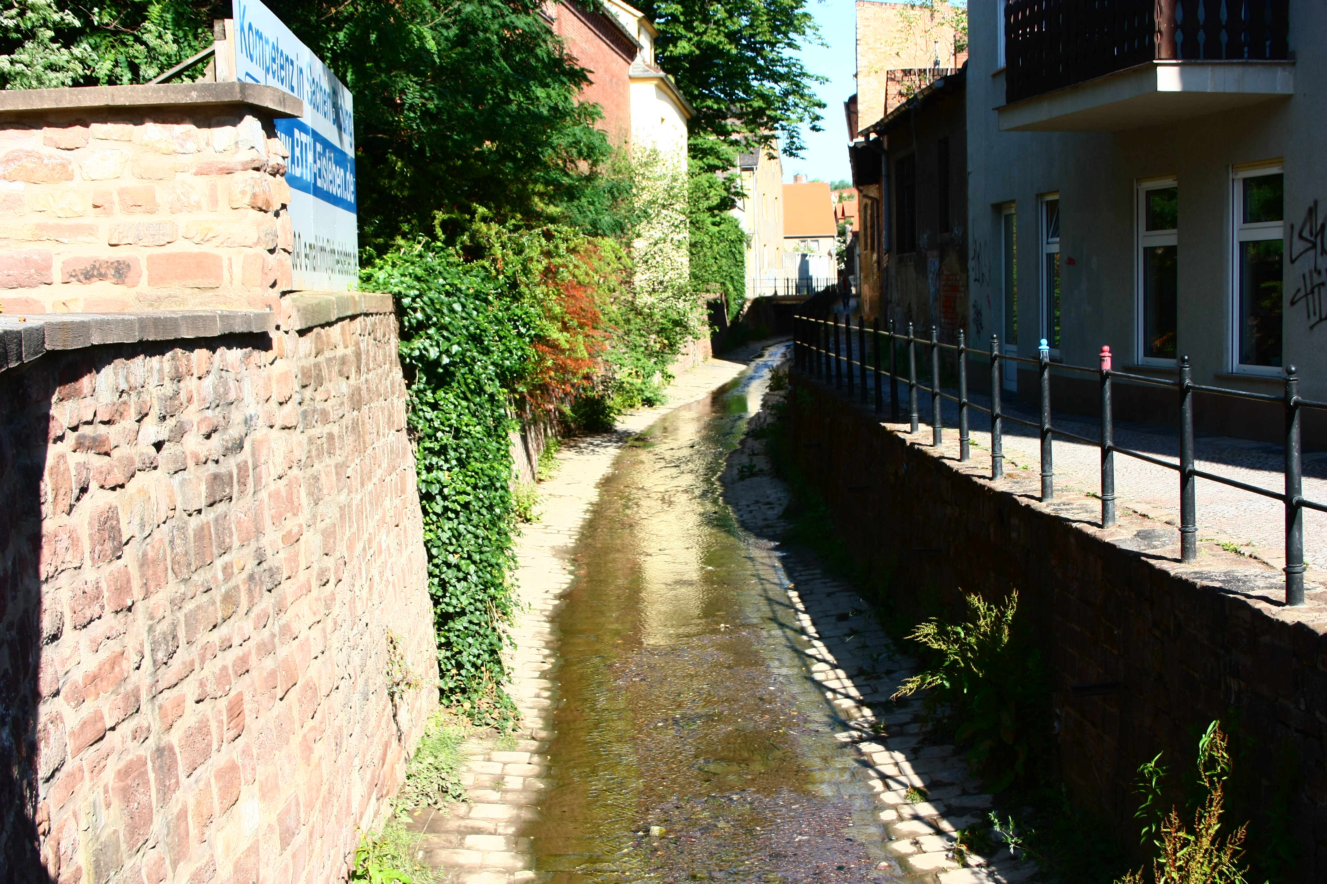 der Bach Böse Sieben in Eisleben